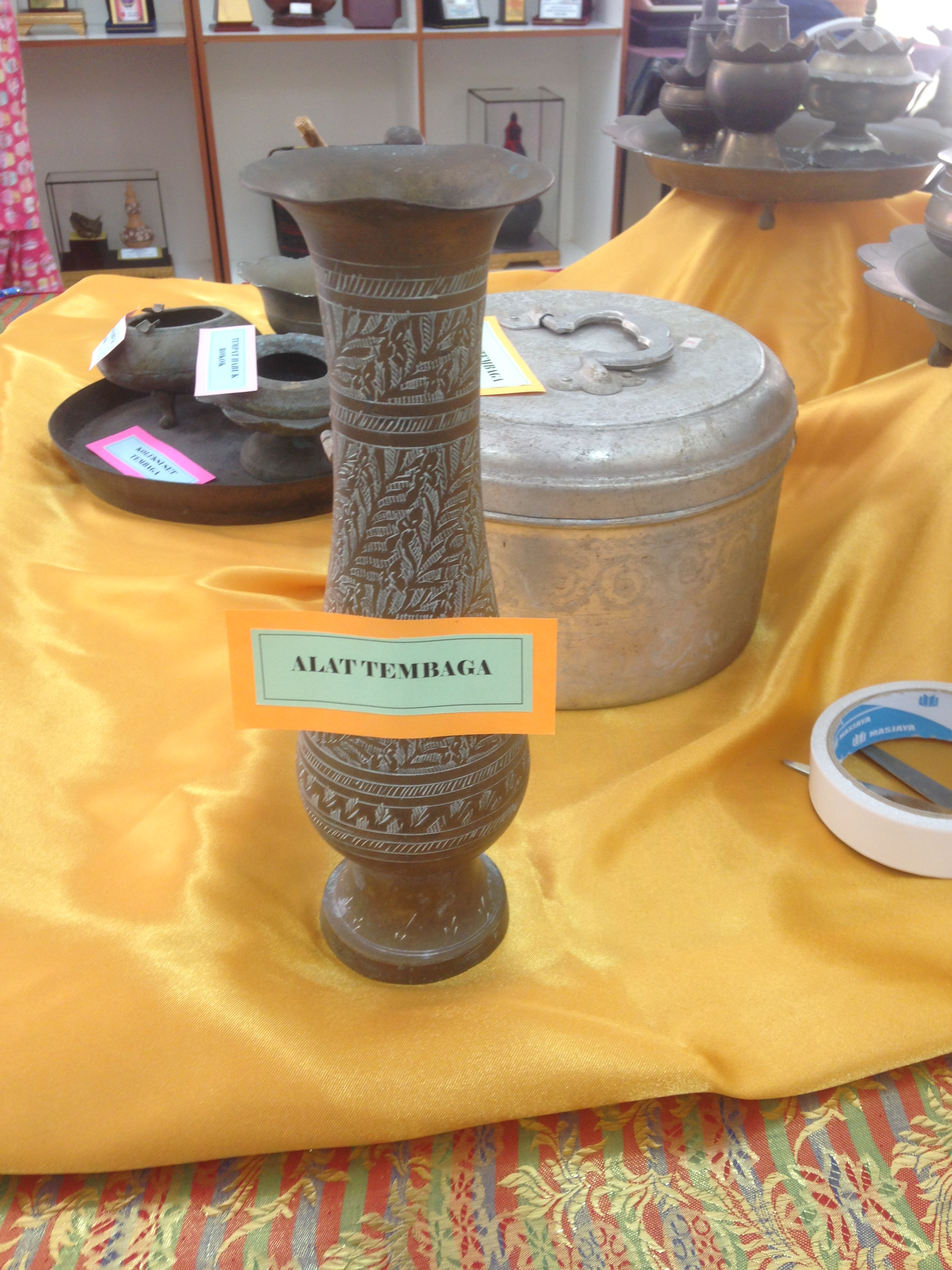 ALAT TEMBAGA